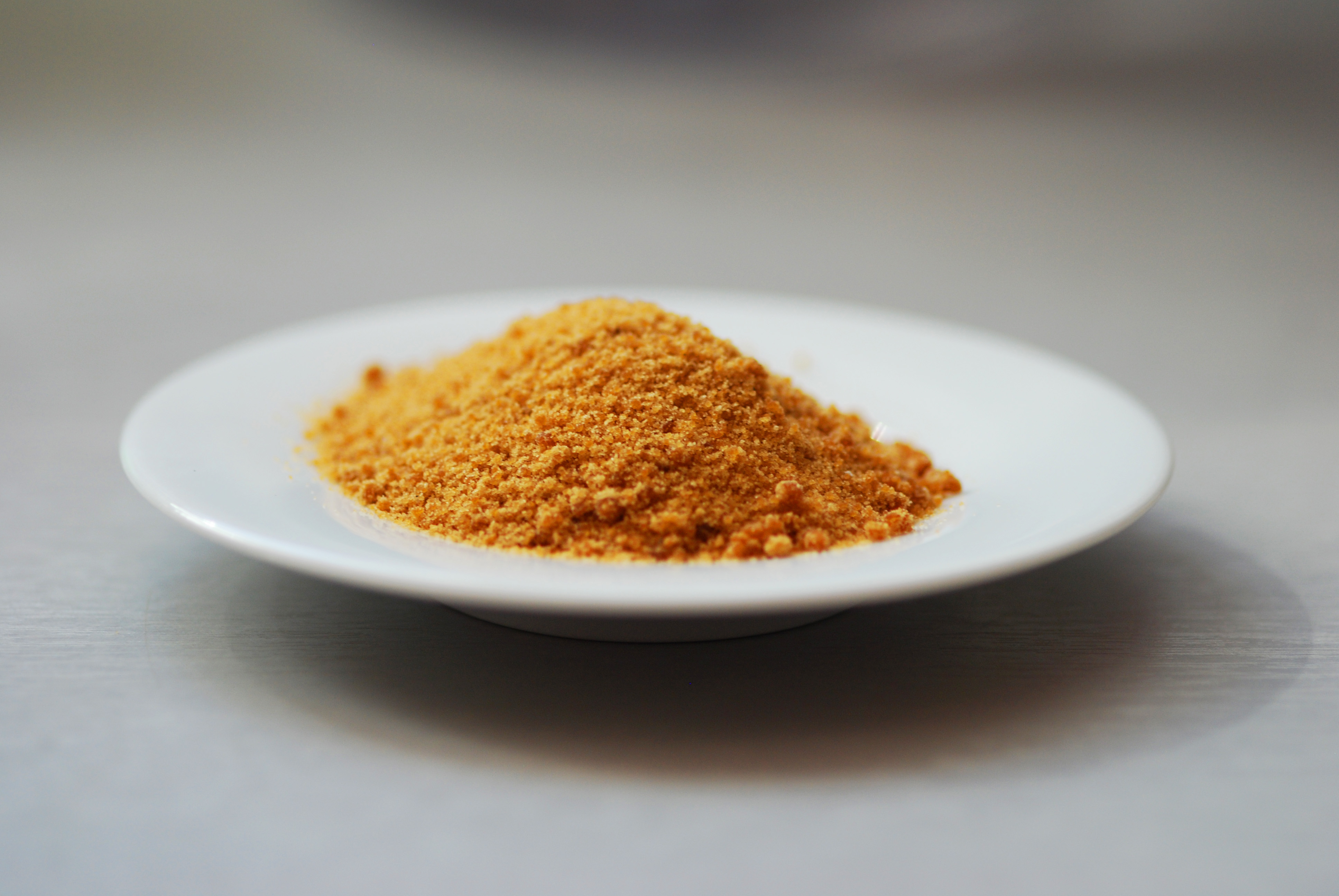 Quelle: D. Albert (Benutzer:User:Dial, eigenes Foto) Beschreibung: Mascobado Zucker. Unraffinierter Vollrohrzucker. Autor: D. Albert Date: Mai 2008